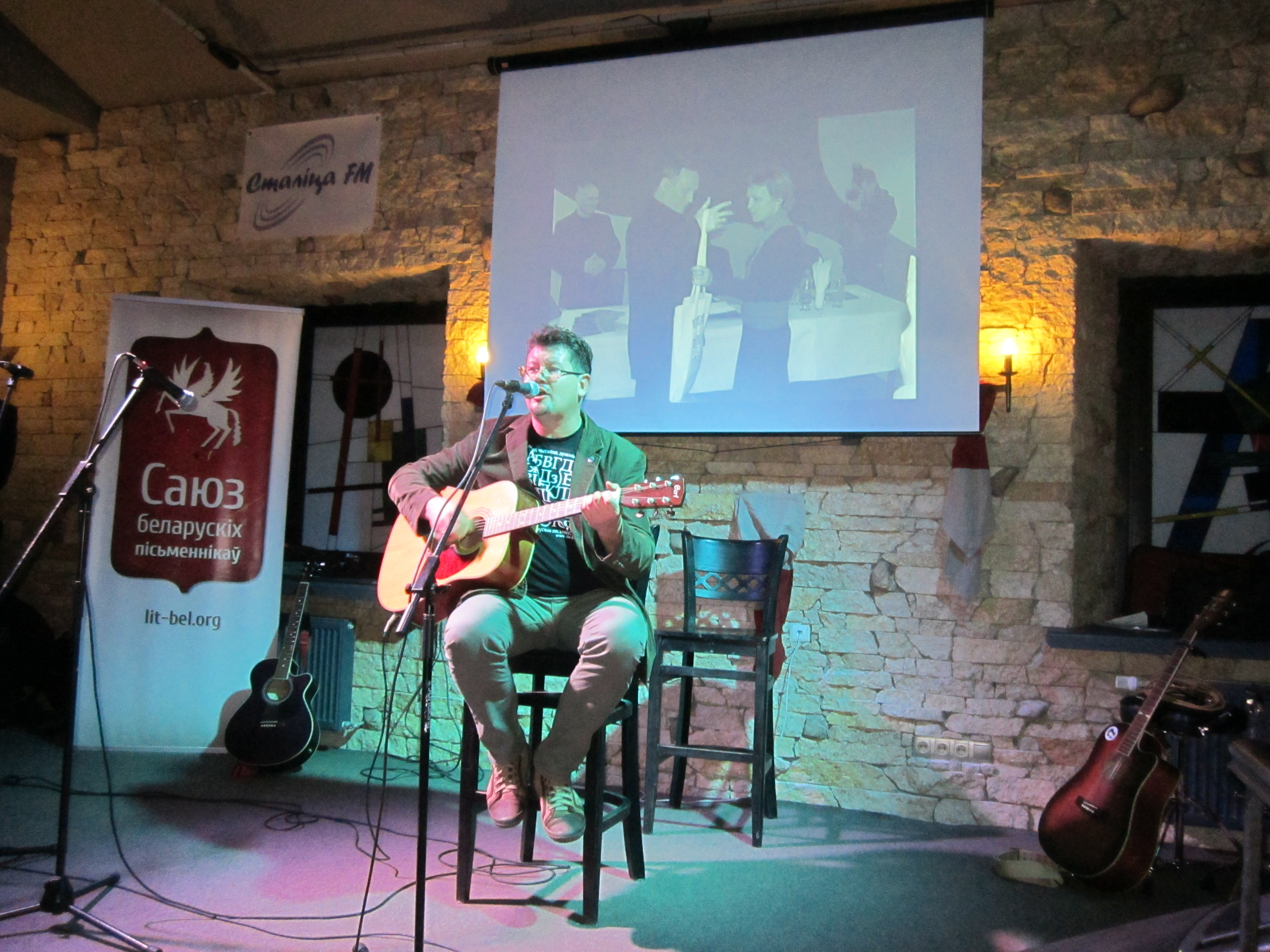 Андрэй Хадановіч. Выступ на 15-годдзі часопіса "Дзеяслоў". Мінск, кафэ "Грай", лістапад 2017 г.